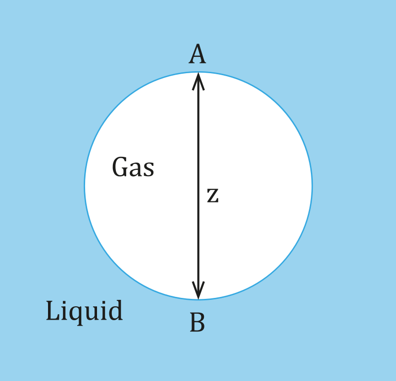 Burbuļa shematisks attēlojums